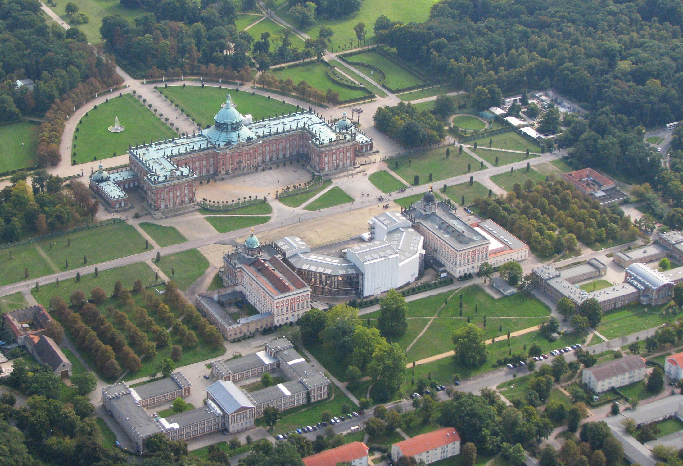 Potsdam, Brandenburg, Luftbild: Neues Palais Schloss westlich im Park Sanssouci.